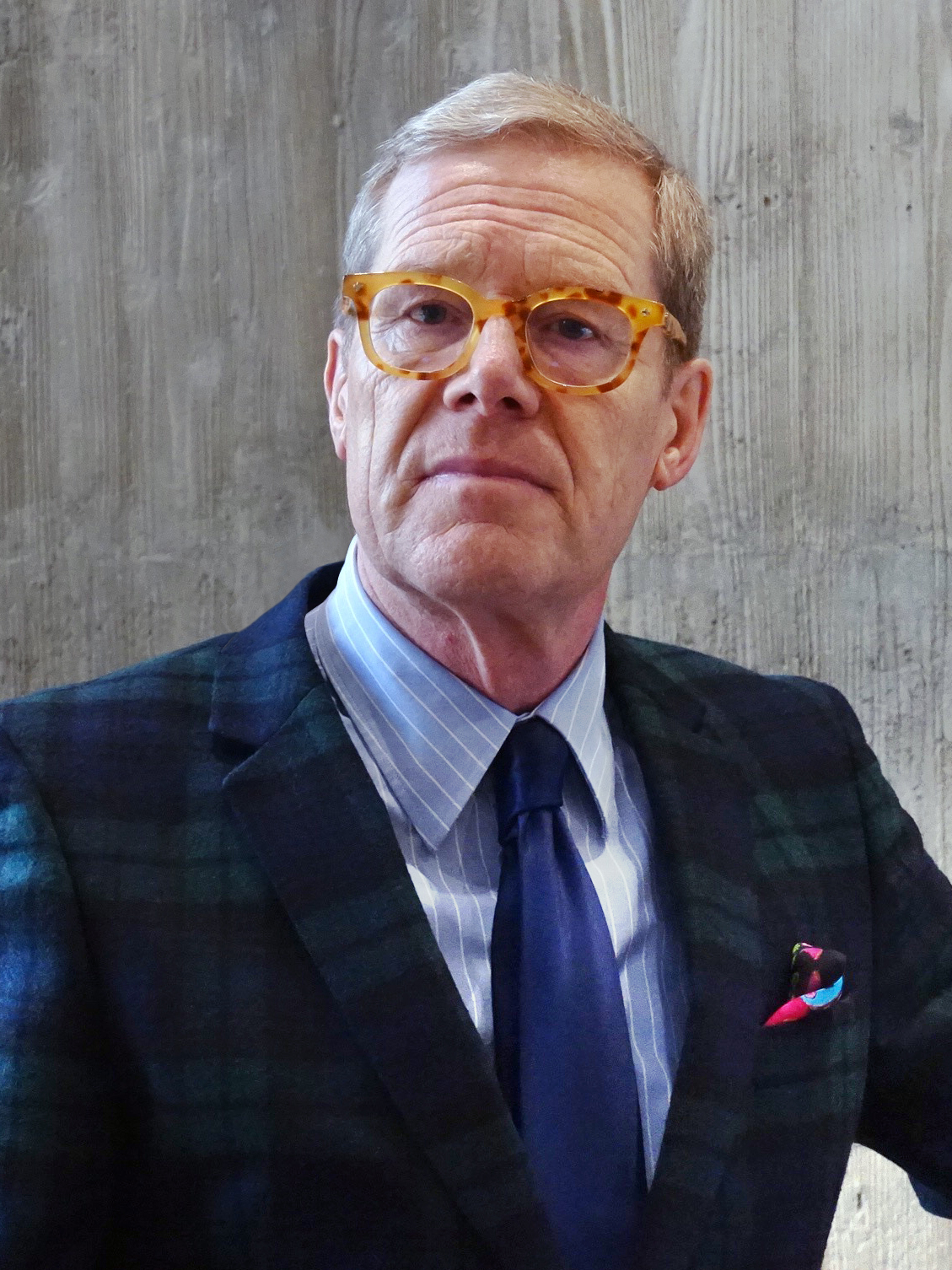 Botschafter Linus von Castelmur